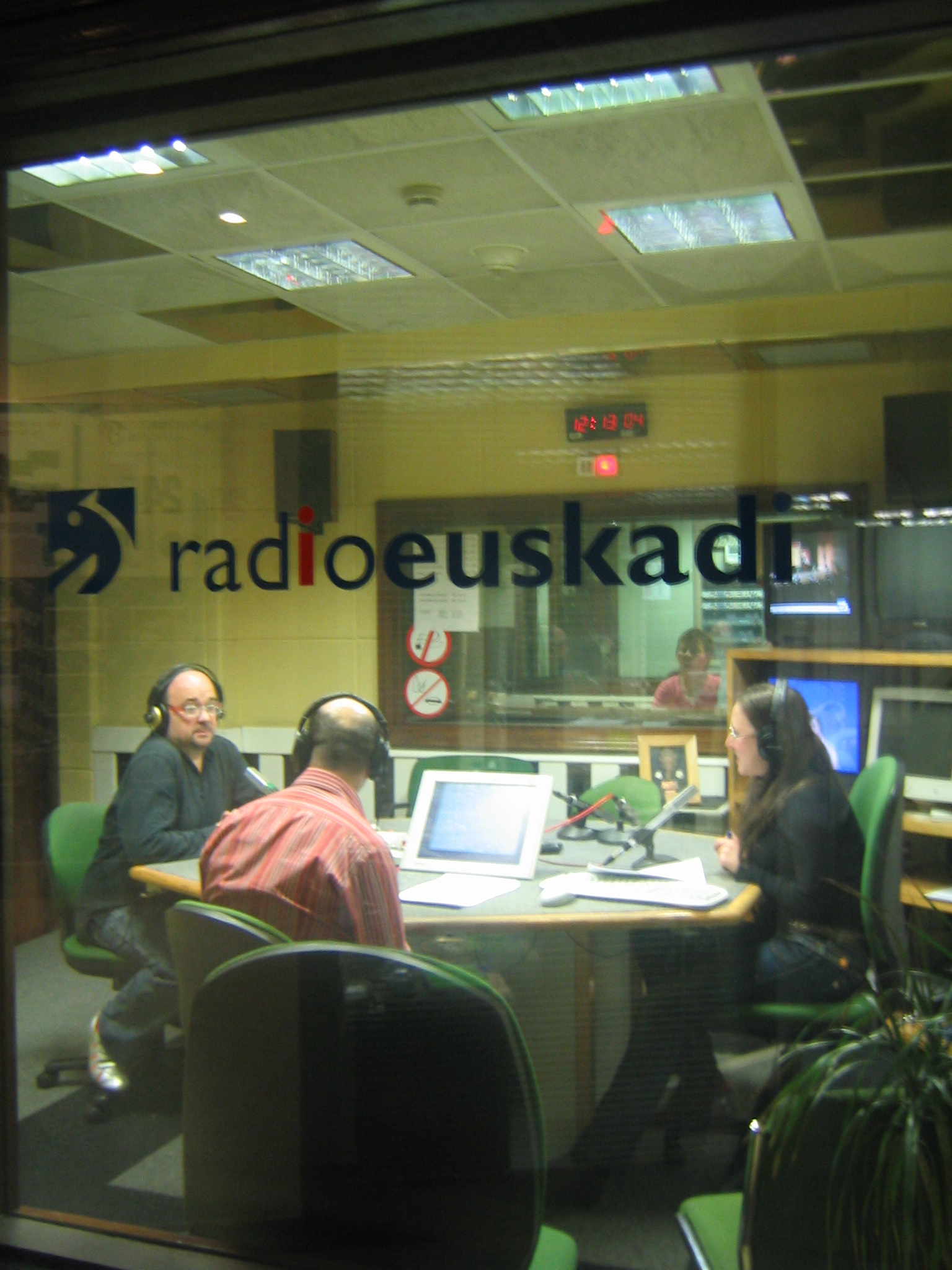 Radio Euskadi en Bilbao, Vizcaya, País Vasco, España.